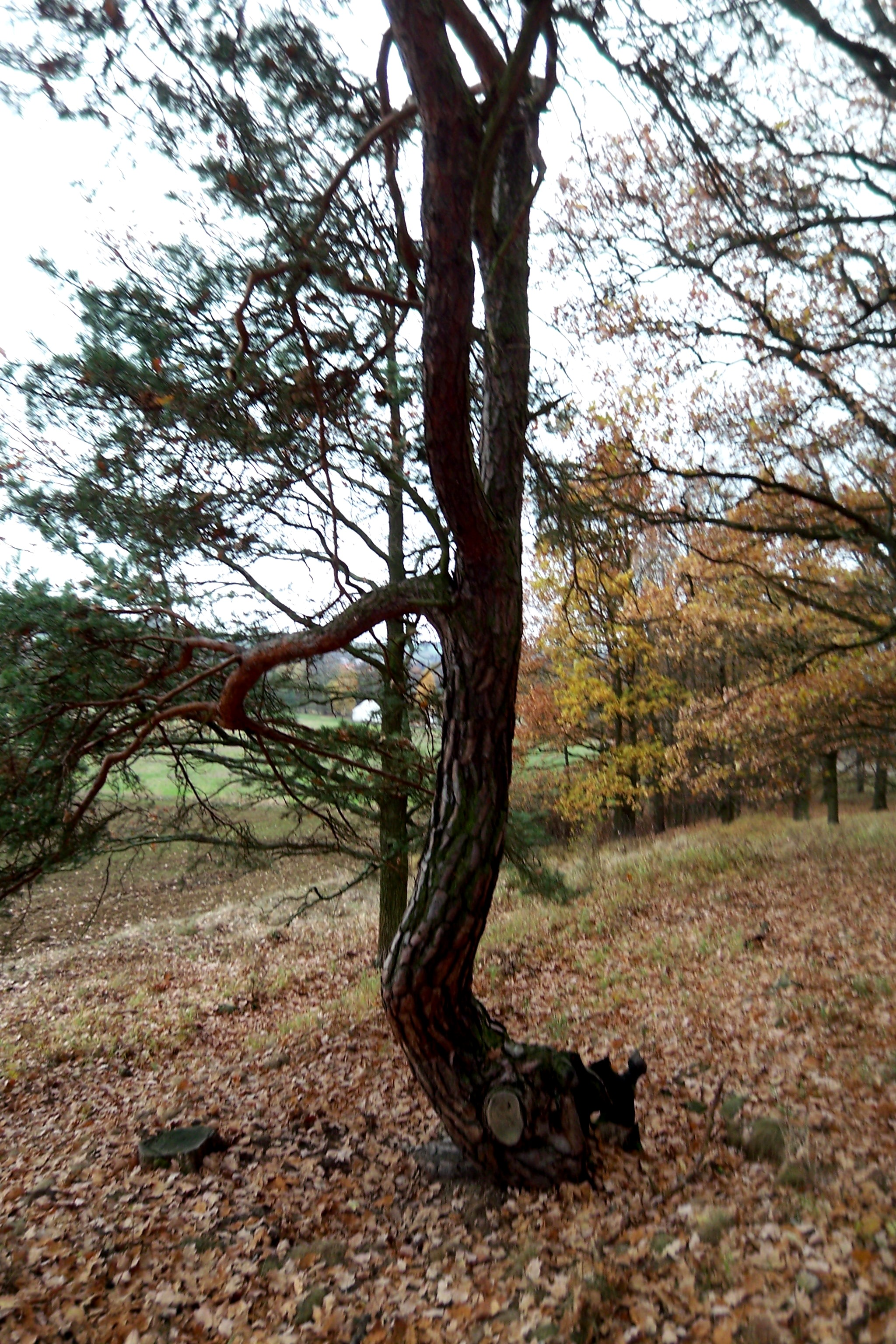 Borovice lesní nacházející se na otevřeném svahu.